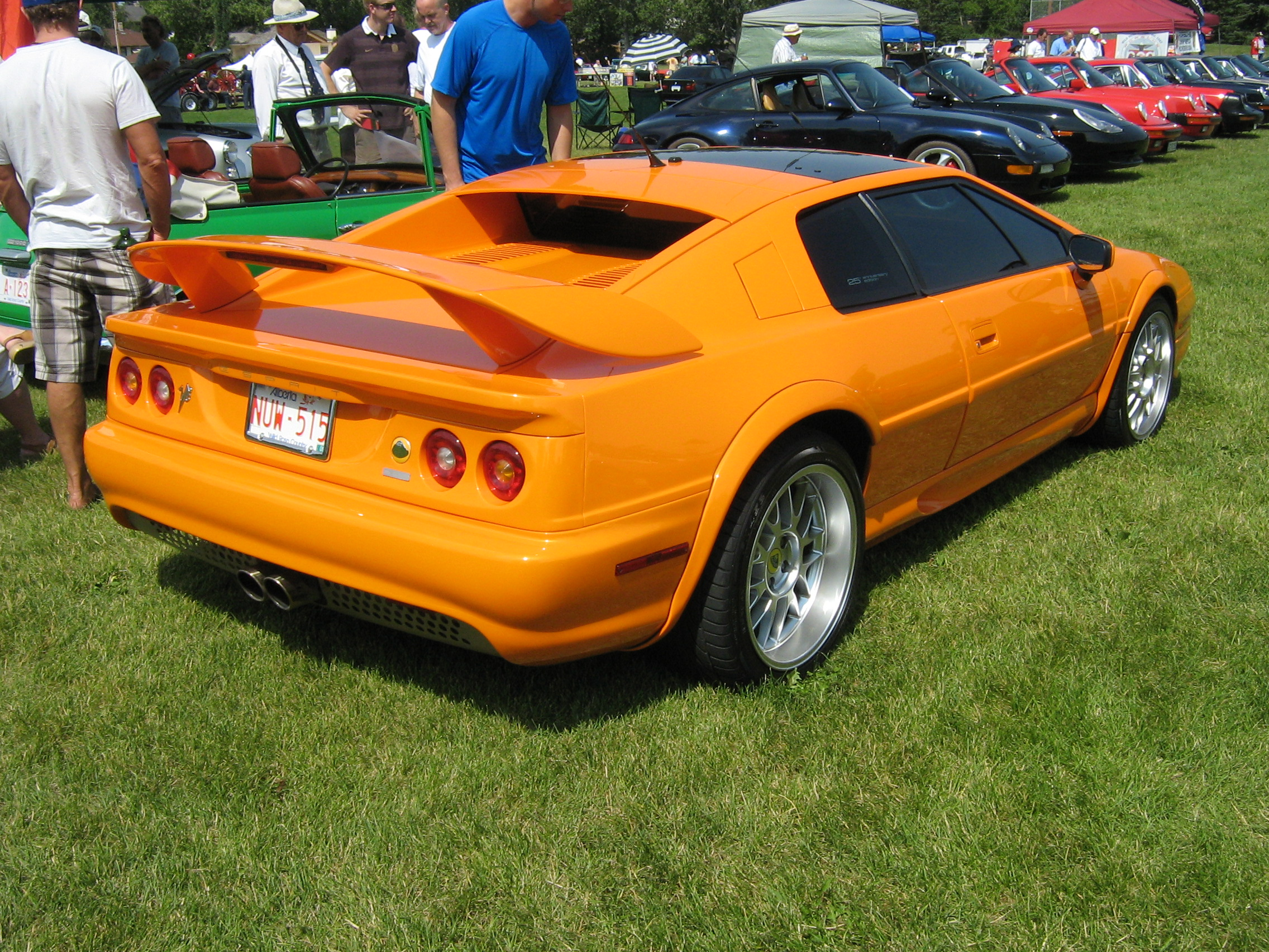 Lotus Esprit V8